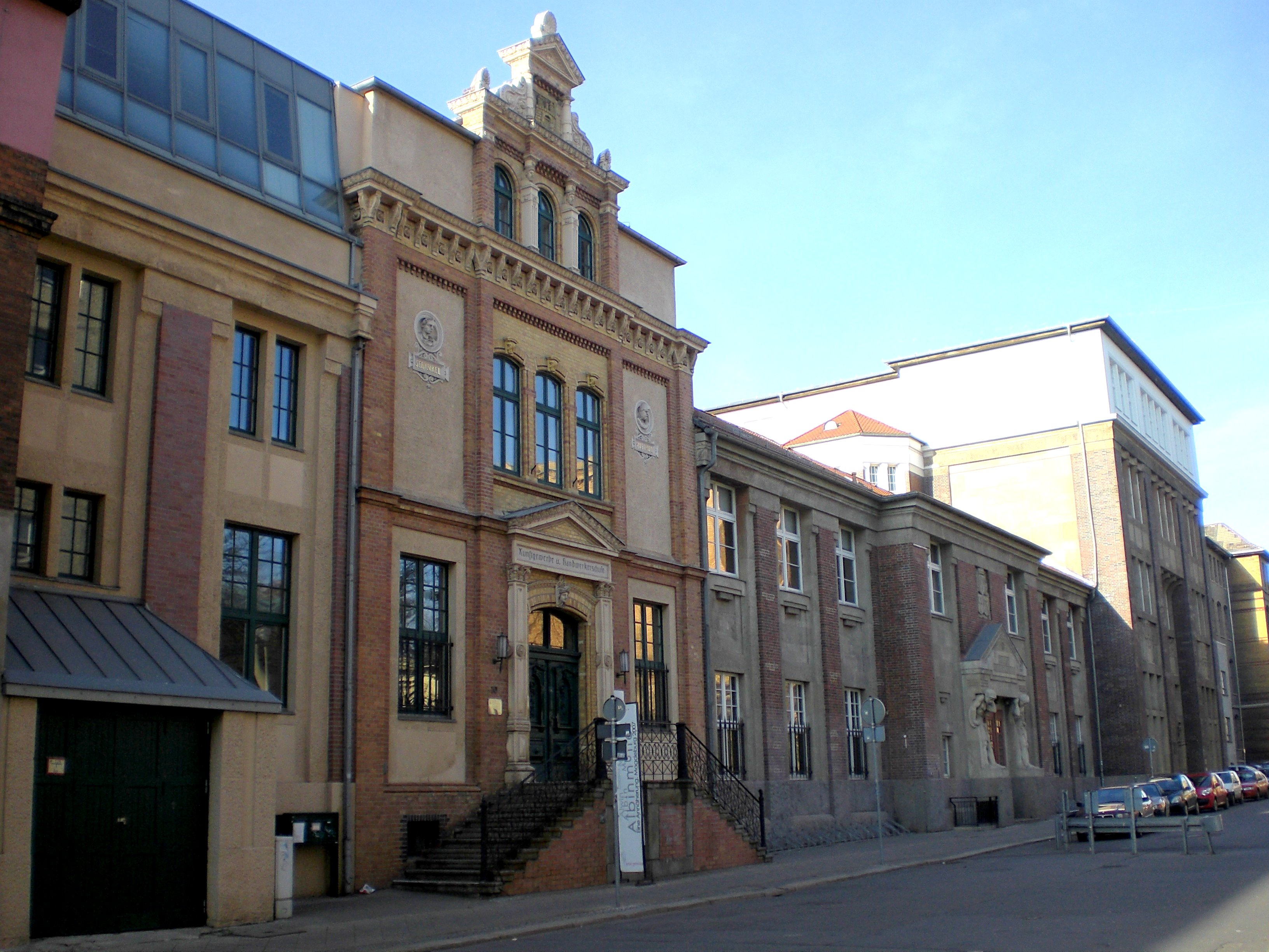 Gebäude der ehemaligen Kunstgewerbe- und Handwerkerschule Magdeburg